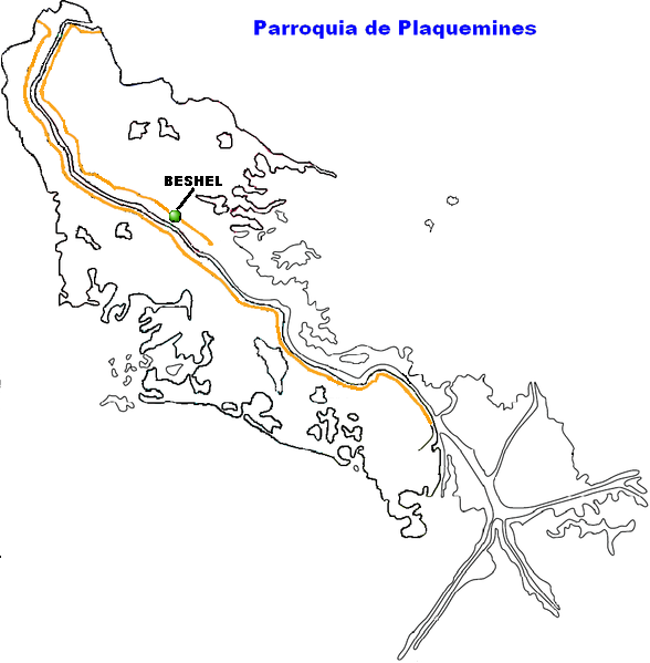 Beshel, Louisiana